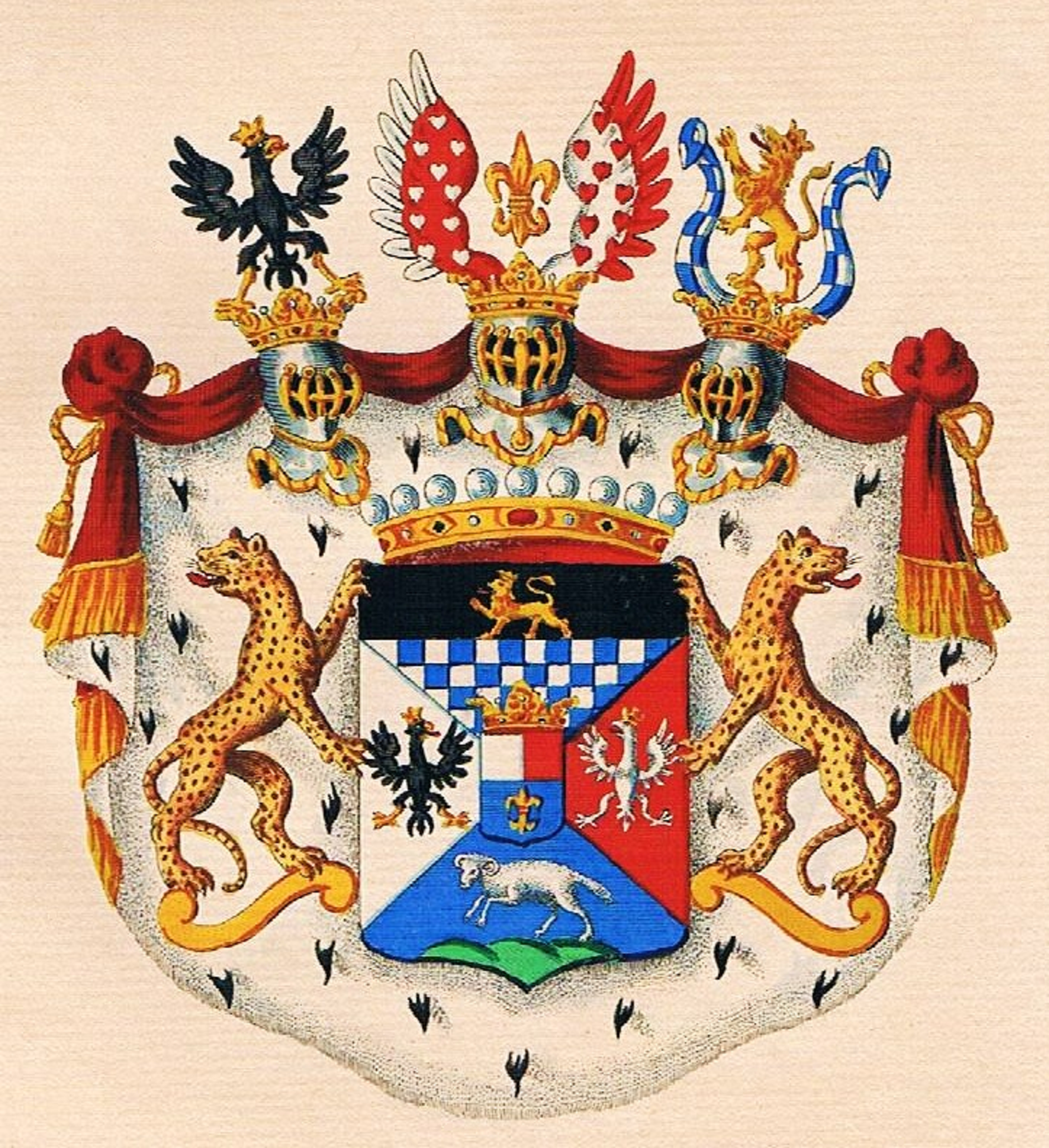 Wappen der Grafen von Beckers zu Westerstetten, original altkolorierter Wappen-Kupferstich im Fürstenkolorit (File:Beckers Westerstetten Wappen2a.jpg)